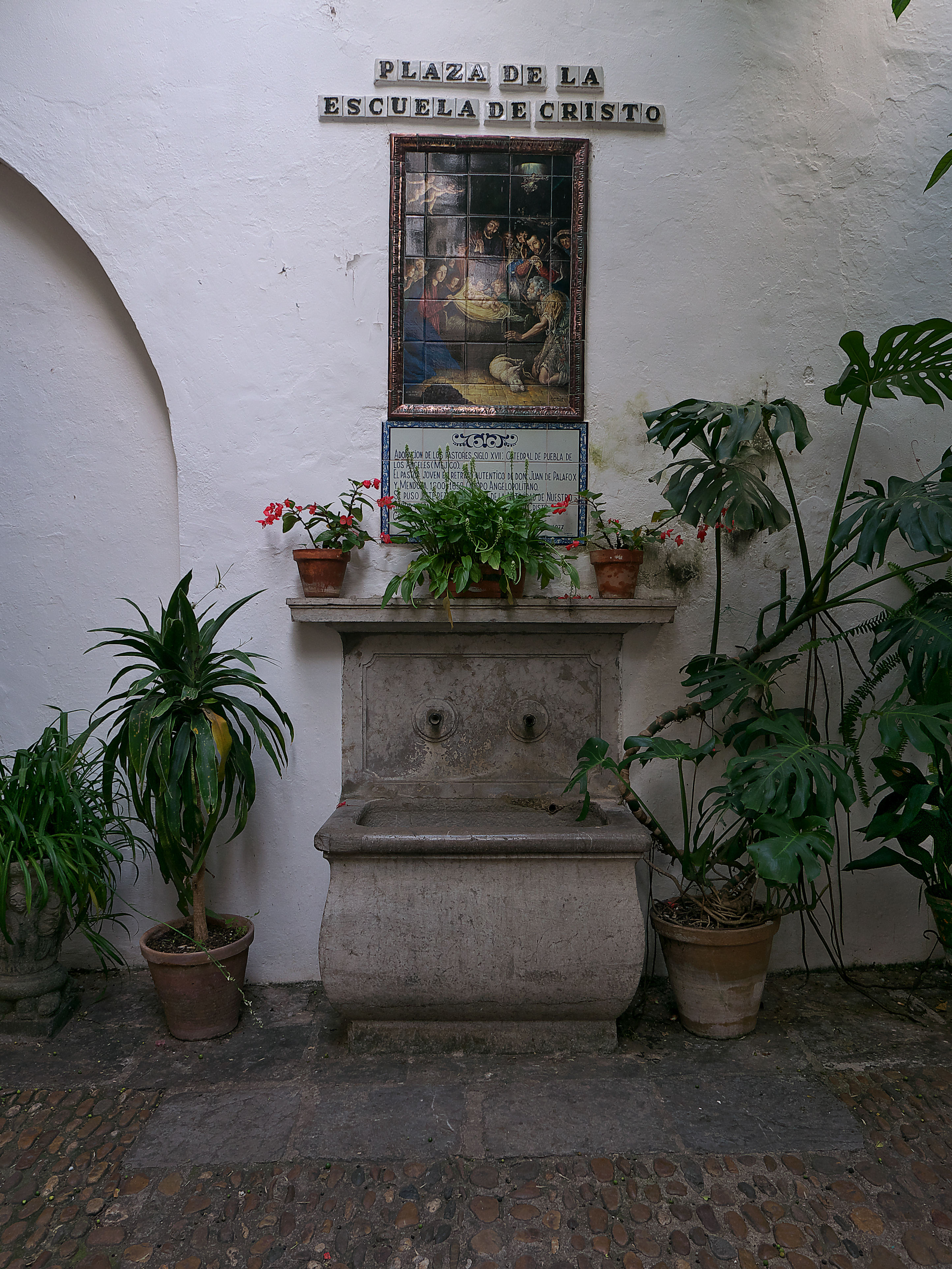 Azulejo alusivo a la Natividad de Nuestro Señor Jesucristo. Reproduce la Adoración de los pastores (s. XVII), de la Catedral de Puebla de los Ándeles, México.